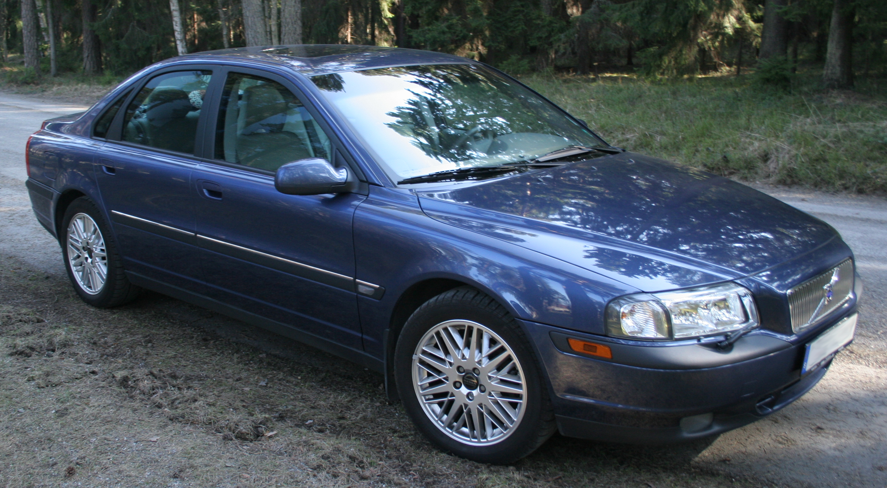 Volvo S80 2,9, modelyear -02, Cosmos Blue